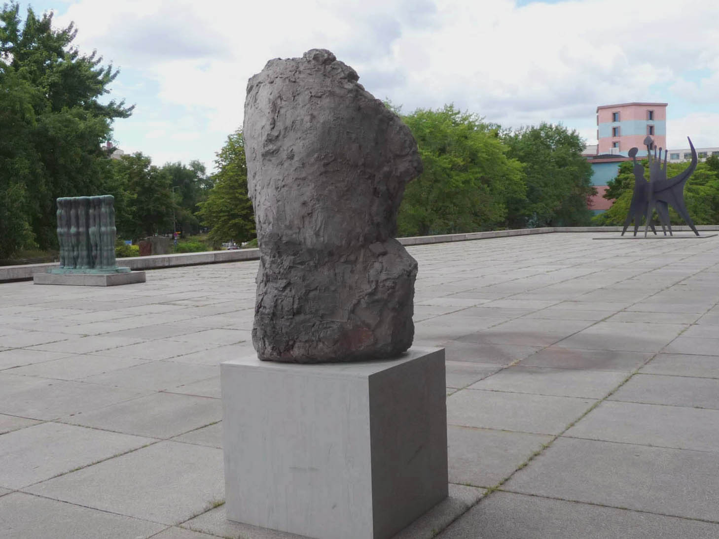 Hans Josephson, o. T., 1990, -Schenkung des Künstlers -, (links: Joannis Avramidis, rechts: Alexander Calder), - Deutschland, Berlin, Neue Nationalgalerie